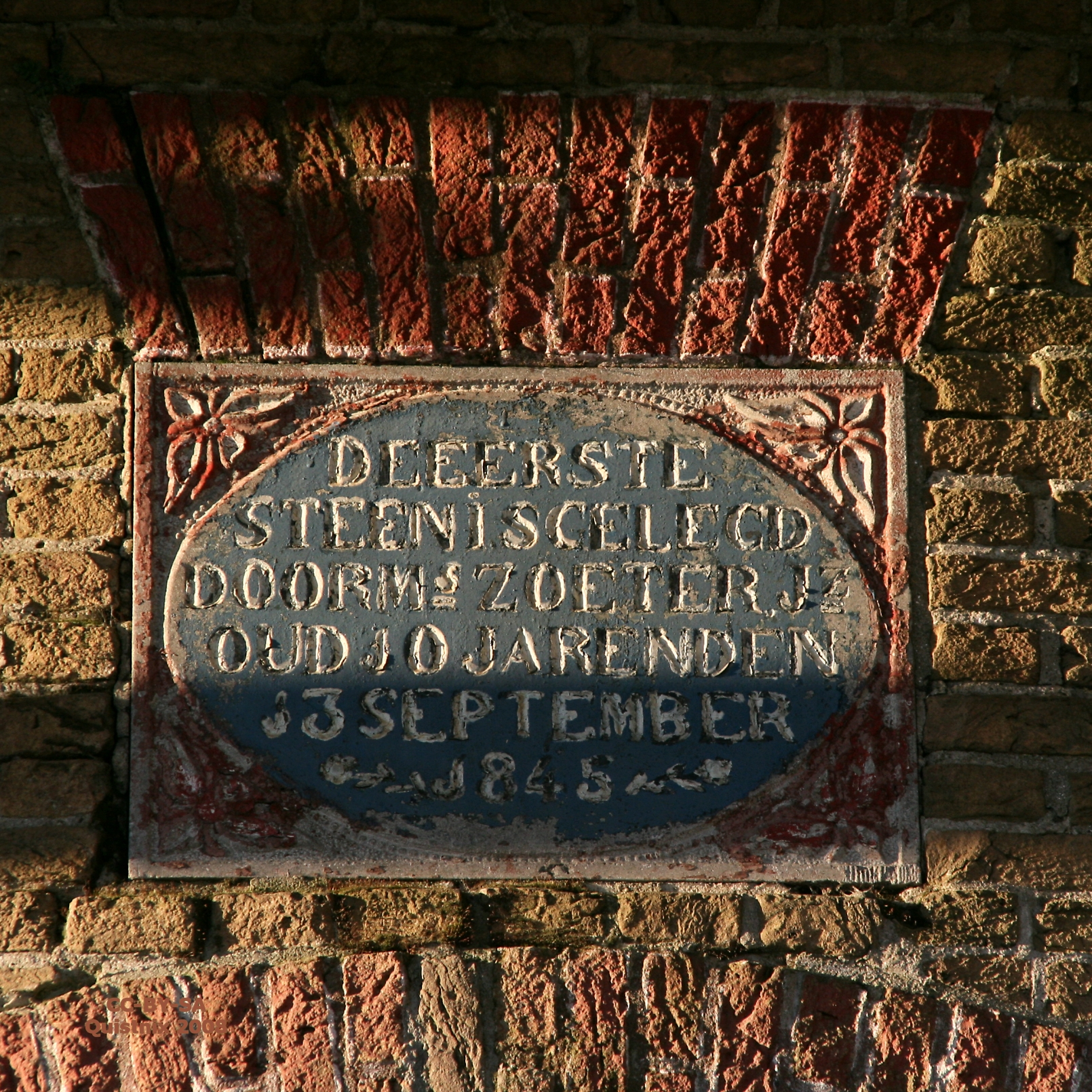 Ouddorp: Molen De Hoop - gedenksteen eerste steenlegging